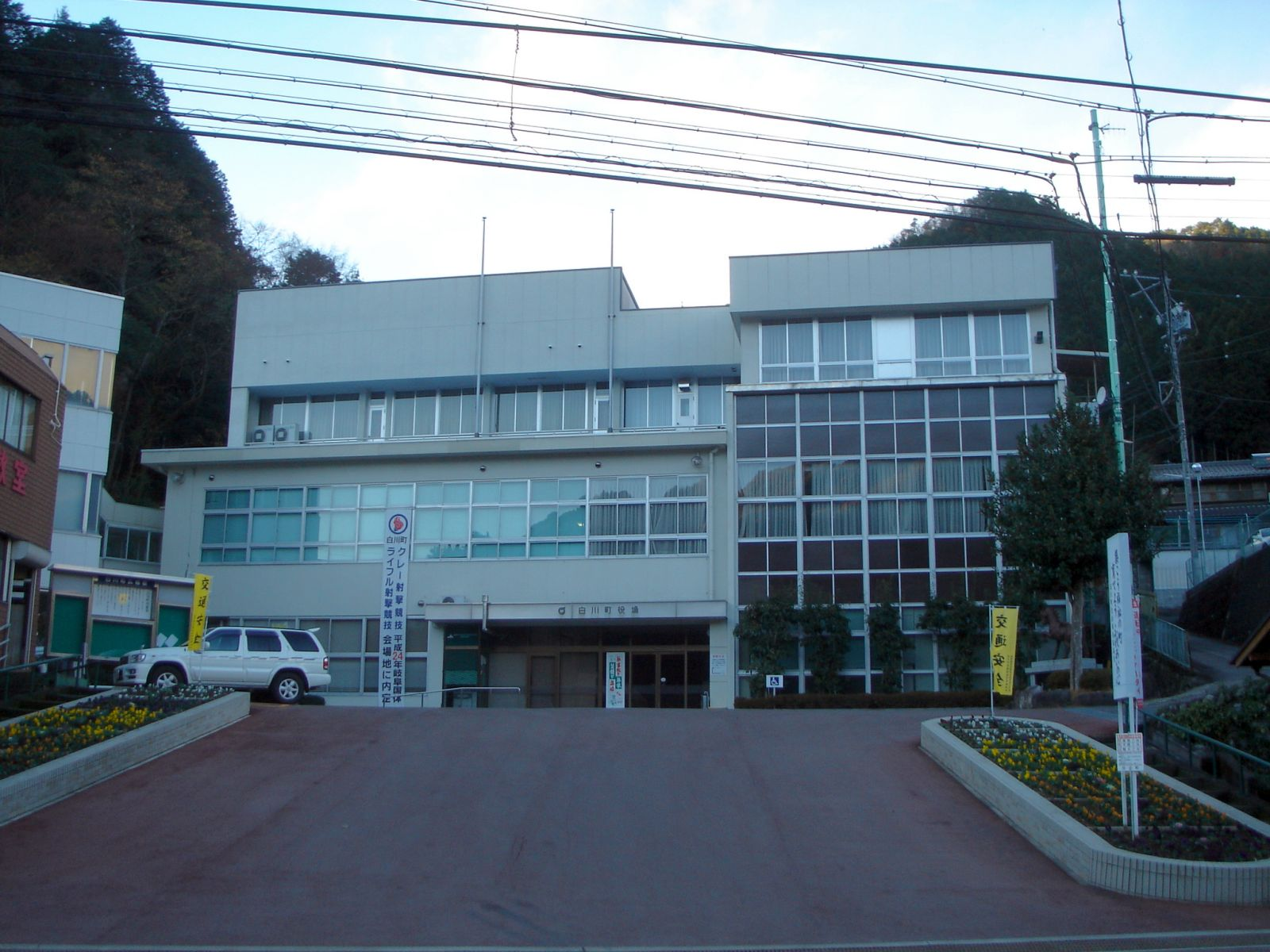 白川町役場、岐阜県加茂郡白川町河岐で撮影